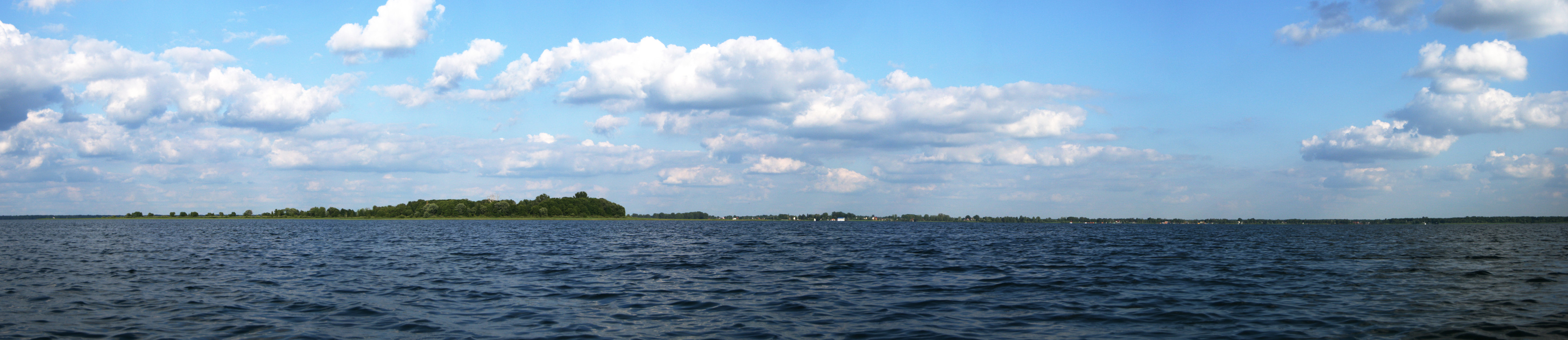 Шацький національний природний парк